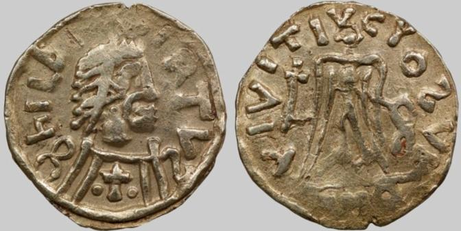 Tiers de sou de Childebert II. BNF, monnaies, médailles et antiques. Avers : Buste diadémé à droite, une croix sur la poitrine. Revers : Victoire debout de face, tenant une croix et une couronne.